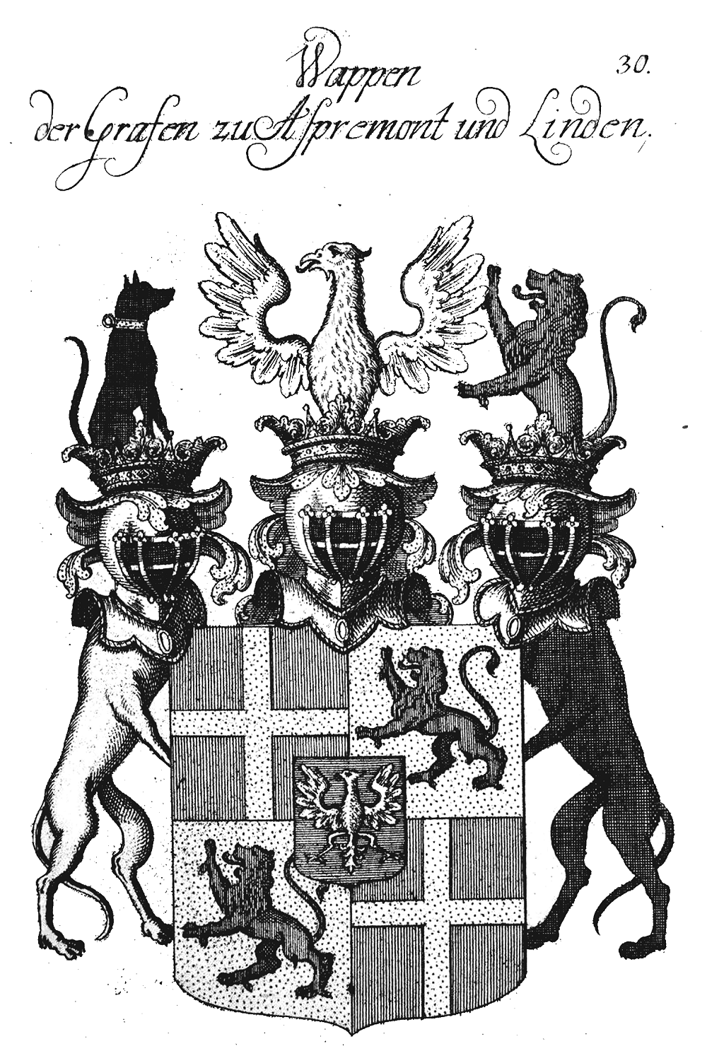 Wappen der Grafen von Aspremont und Linden